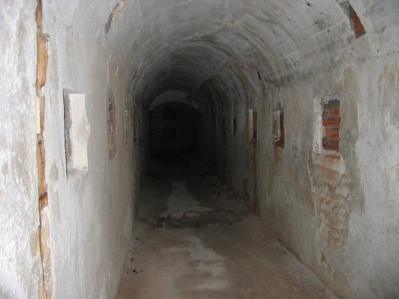 Fotografia scattata da me nel settembre del 2005, con la mia fotocamera digitale